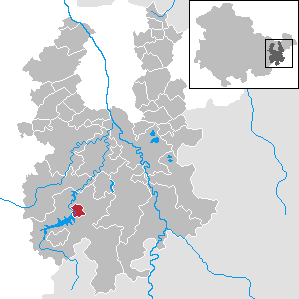 Weißendorf in Thuringia - District Greiz